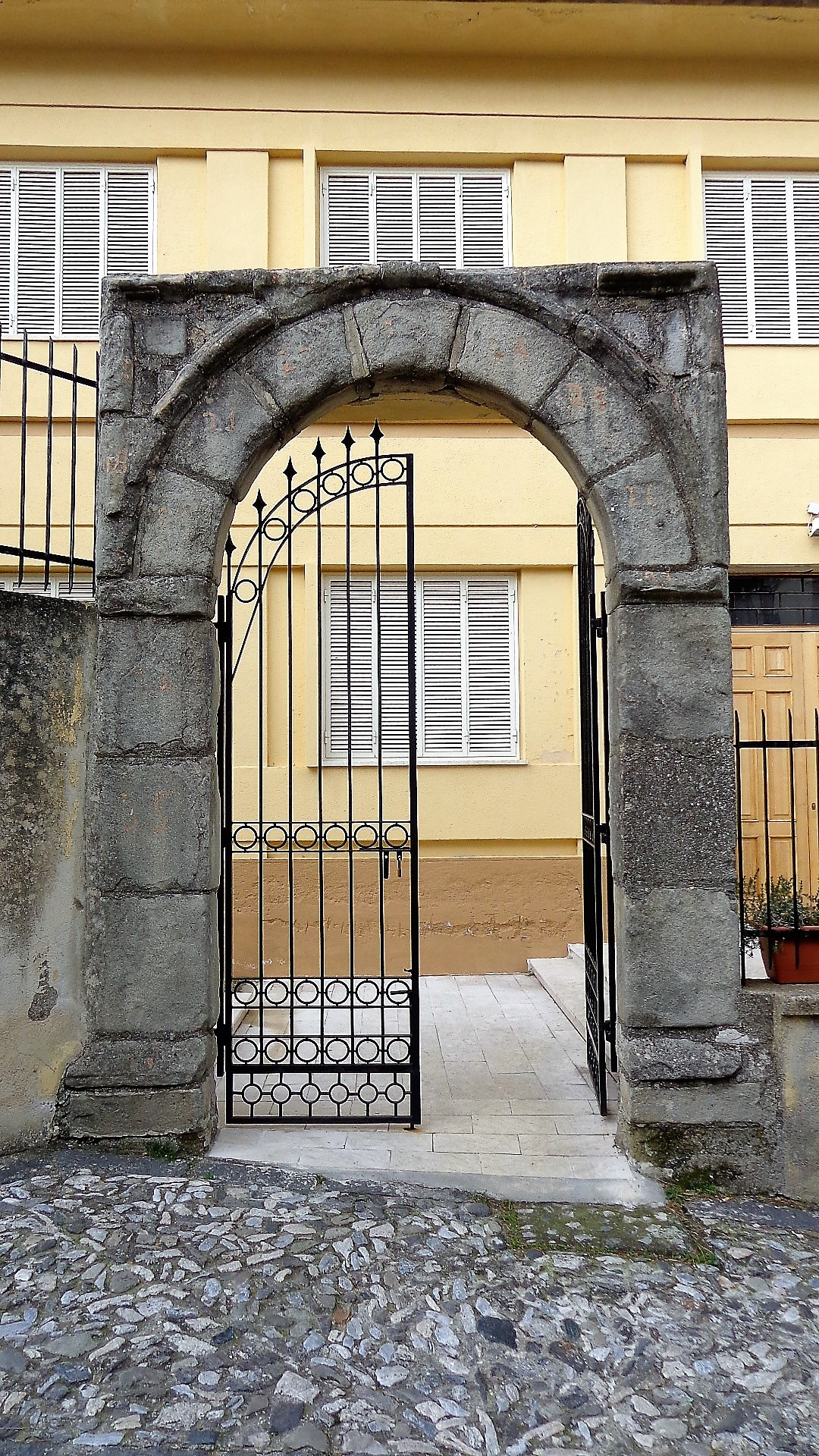 Portale di via Guglielmo Siracusa